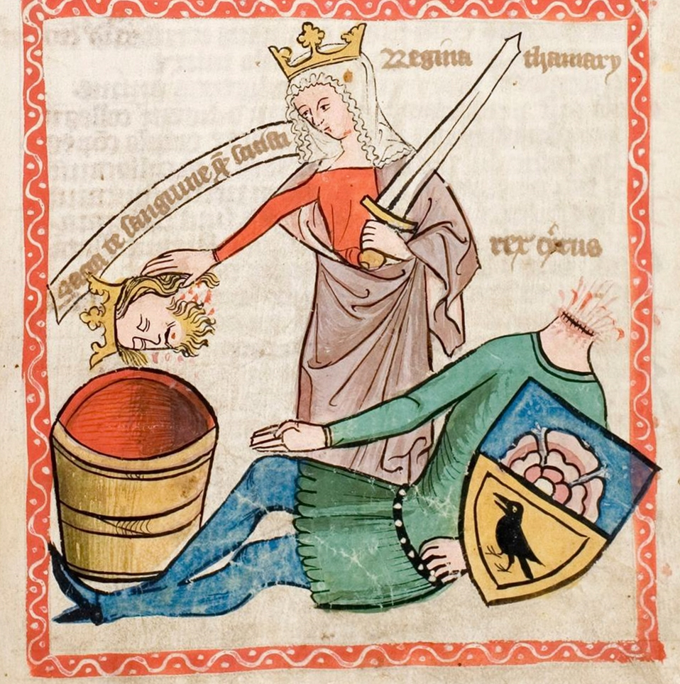 Speculum Humanae Salvationis, Westfalen oder Köln, um 1360. ULB Darmstadt, Hs 2505, fol. 57r